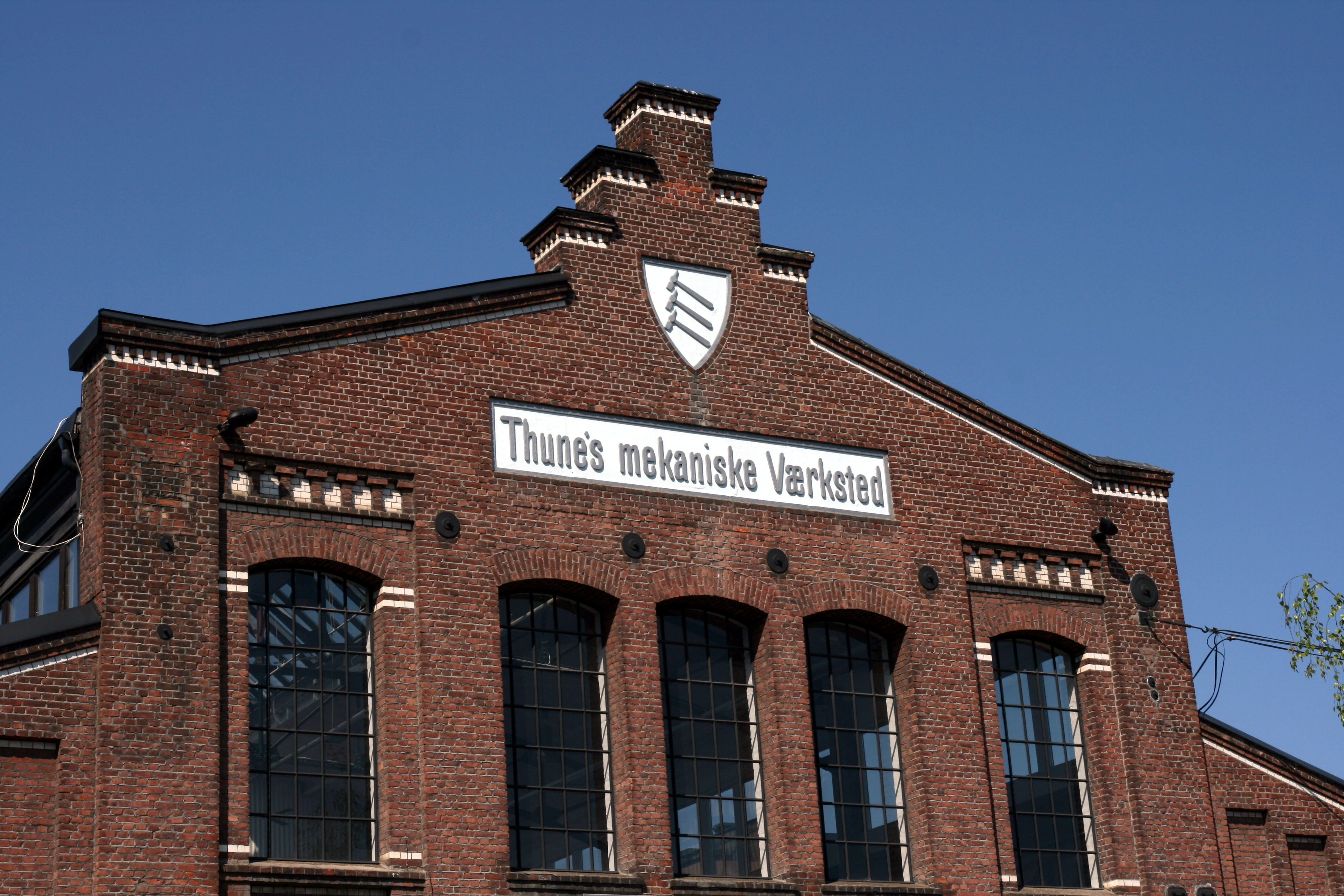 Fra Thunes mekaniske verksted på Skøyen i Oslo.